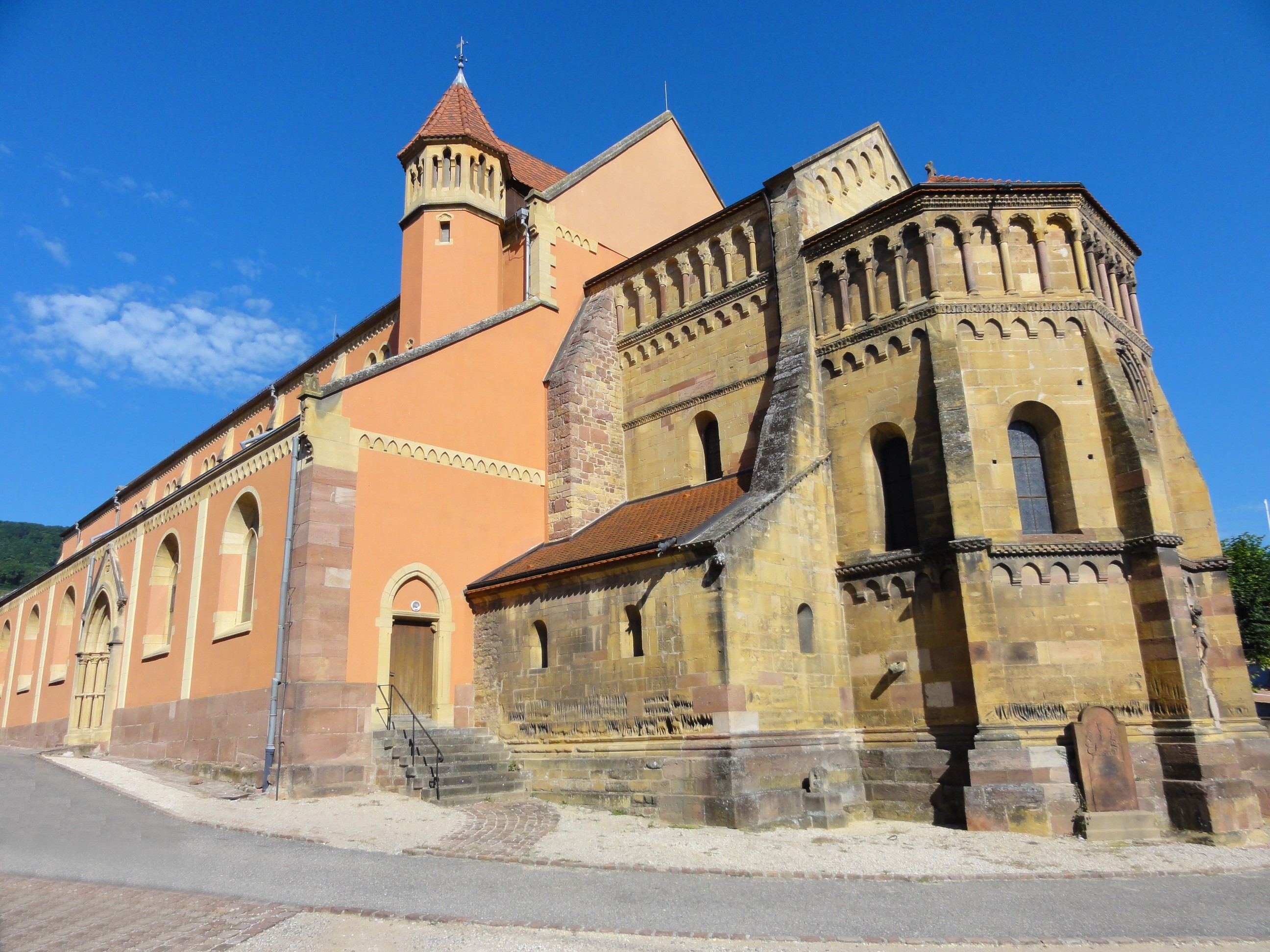 Alsace, Haut-Rhin, Église Saint-Martin (XIIIe-XIXe) de Pfaffenheim (PA00085583, IA68004314).